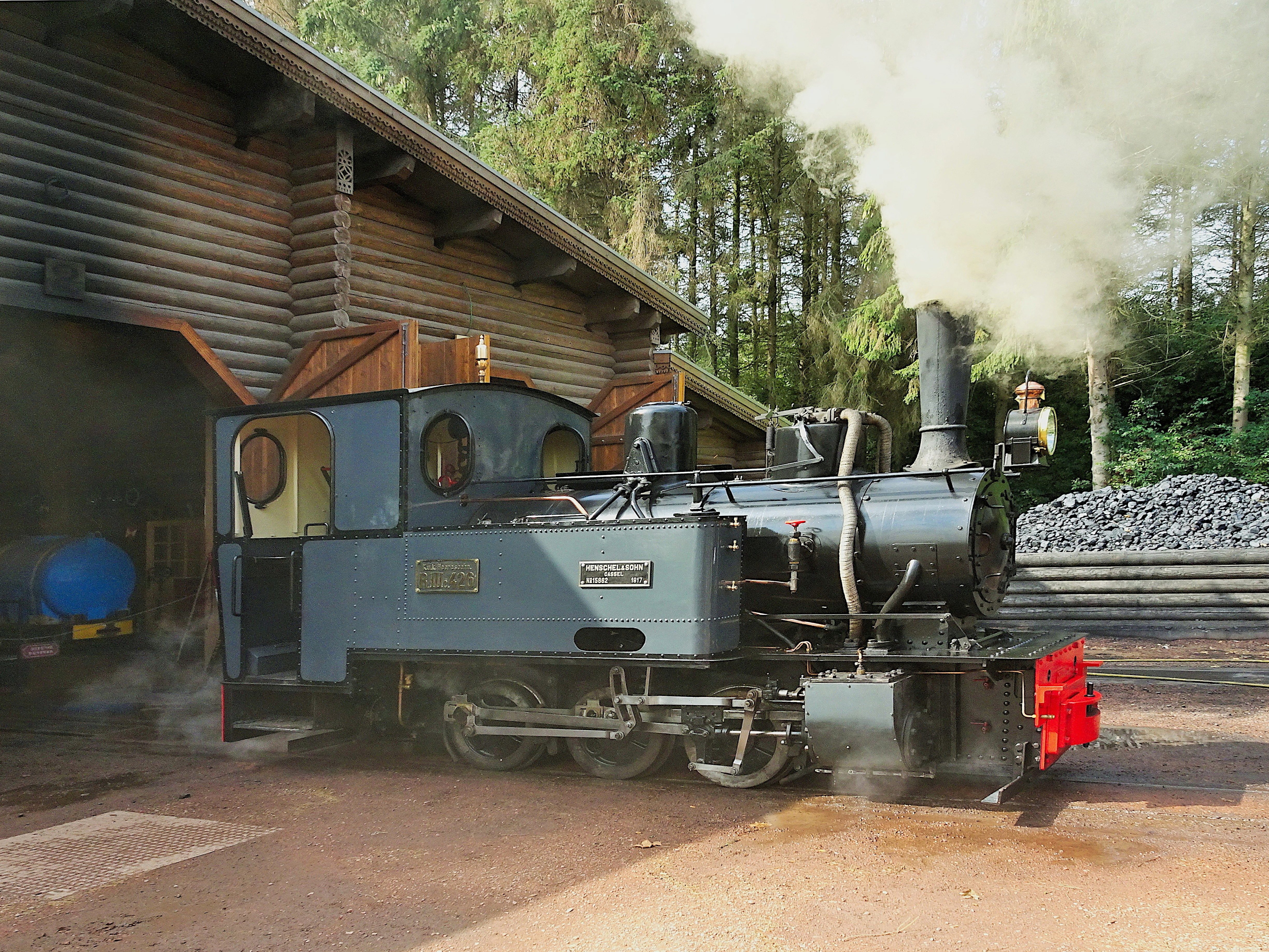 Atelier du train: Jauge 2 'Brigadalok 0-8-0T Henschel No.15862 de 1917 qui, après la fin de la Première Guerre mondiale, a été achetée par le Sena Sugar Estate au Mozambique à Pairi Daiza, dans le parc animalier à Cambron-Casteau, Belgique